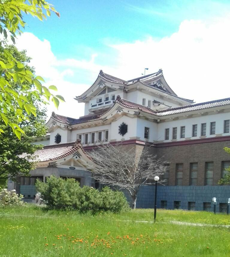 Здание музея. Октябрь 2018 года